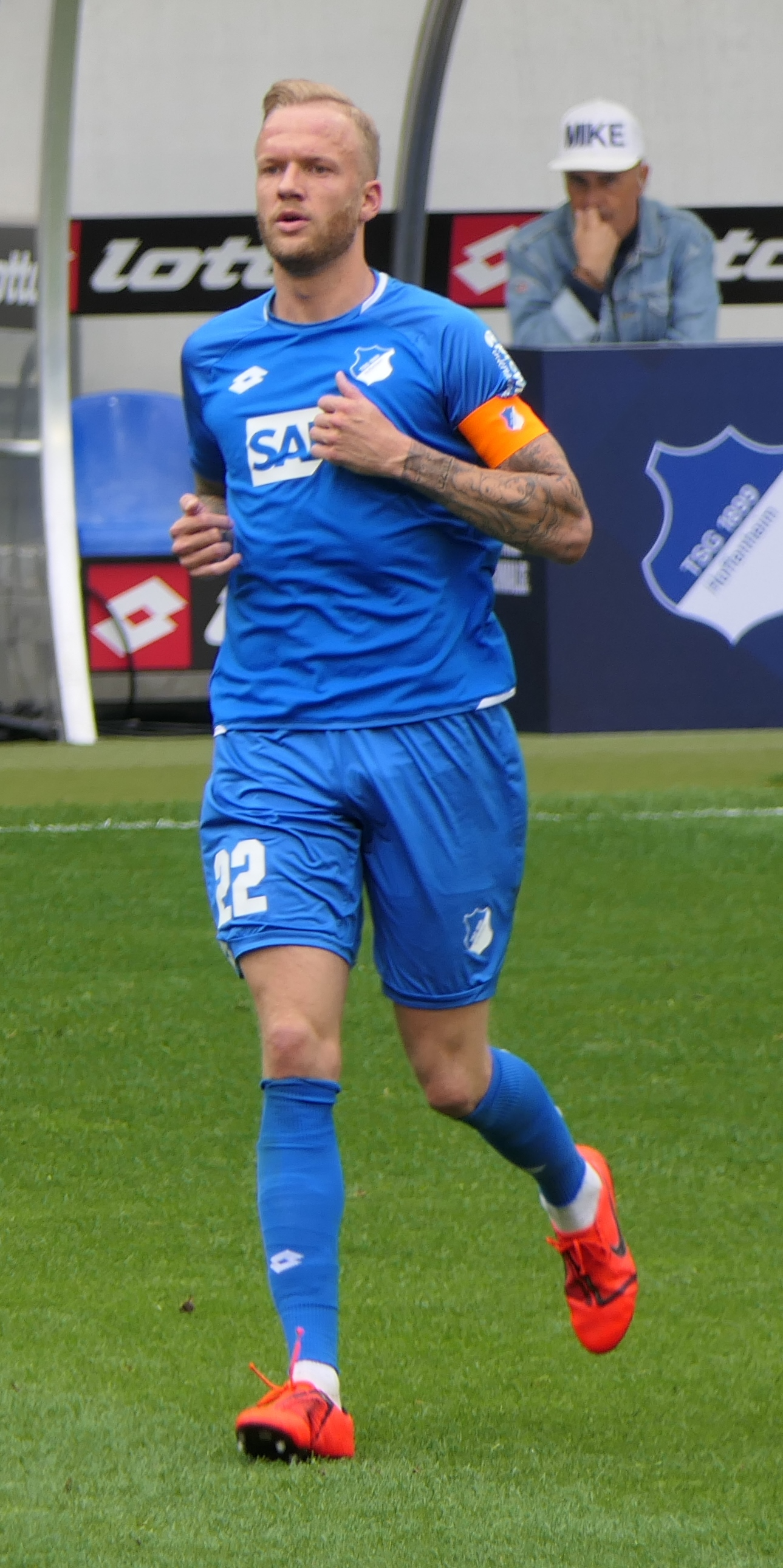 Der Fussballprofi Kevin Vogt im Trikot der TSG 1899 Hoffenheim beim Heimspiel gegen den SV Werder Bremen am 11.05.2019.